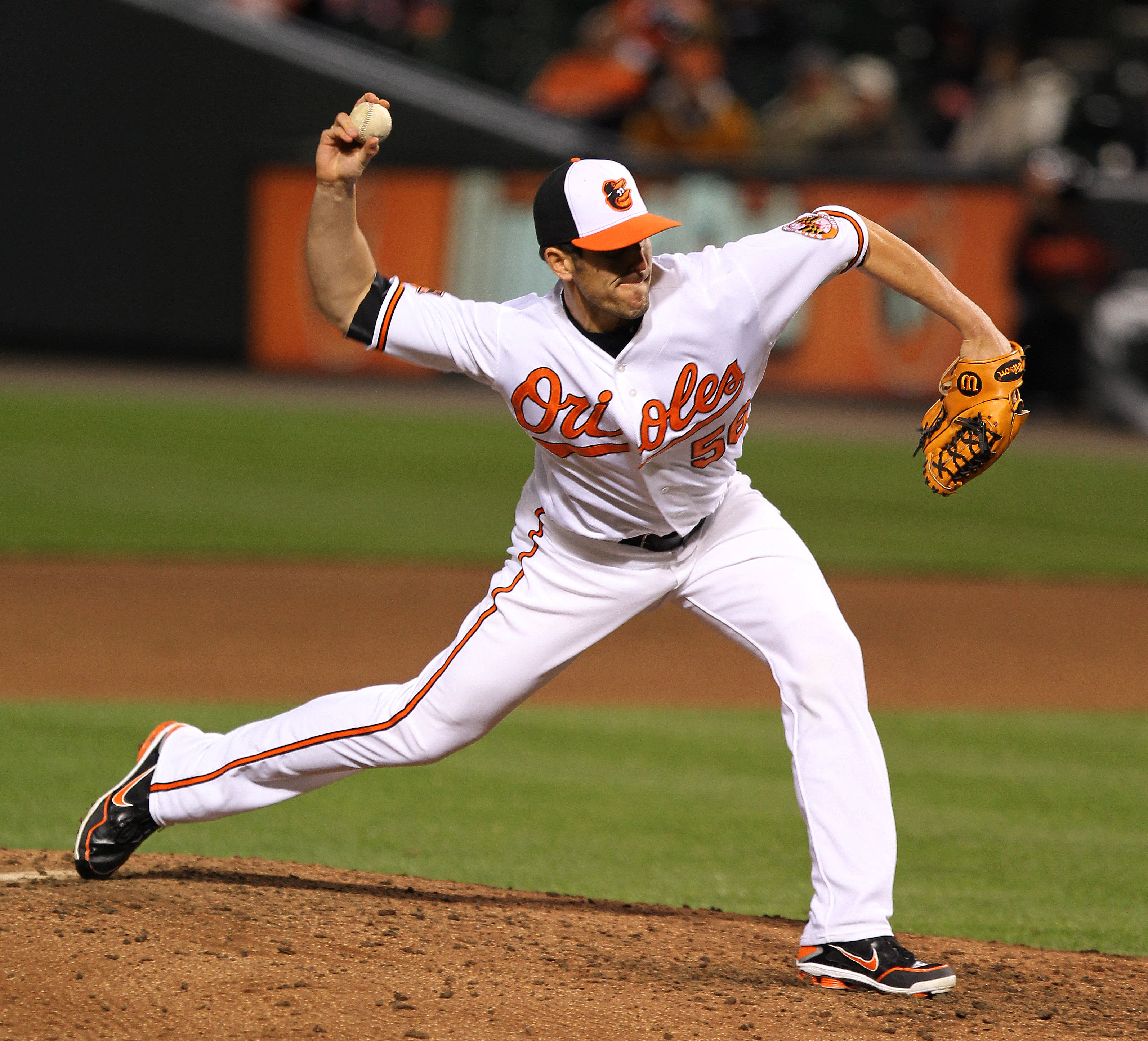 Darren O'Day